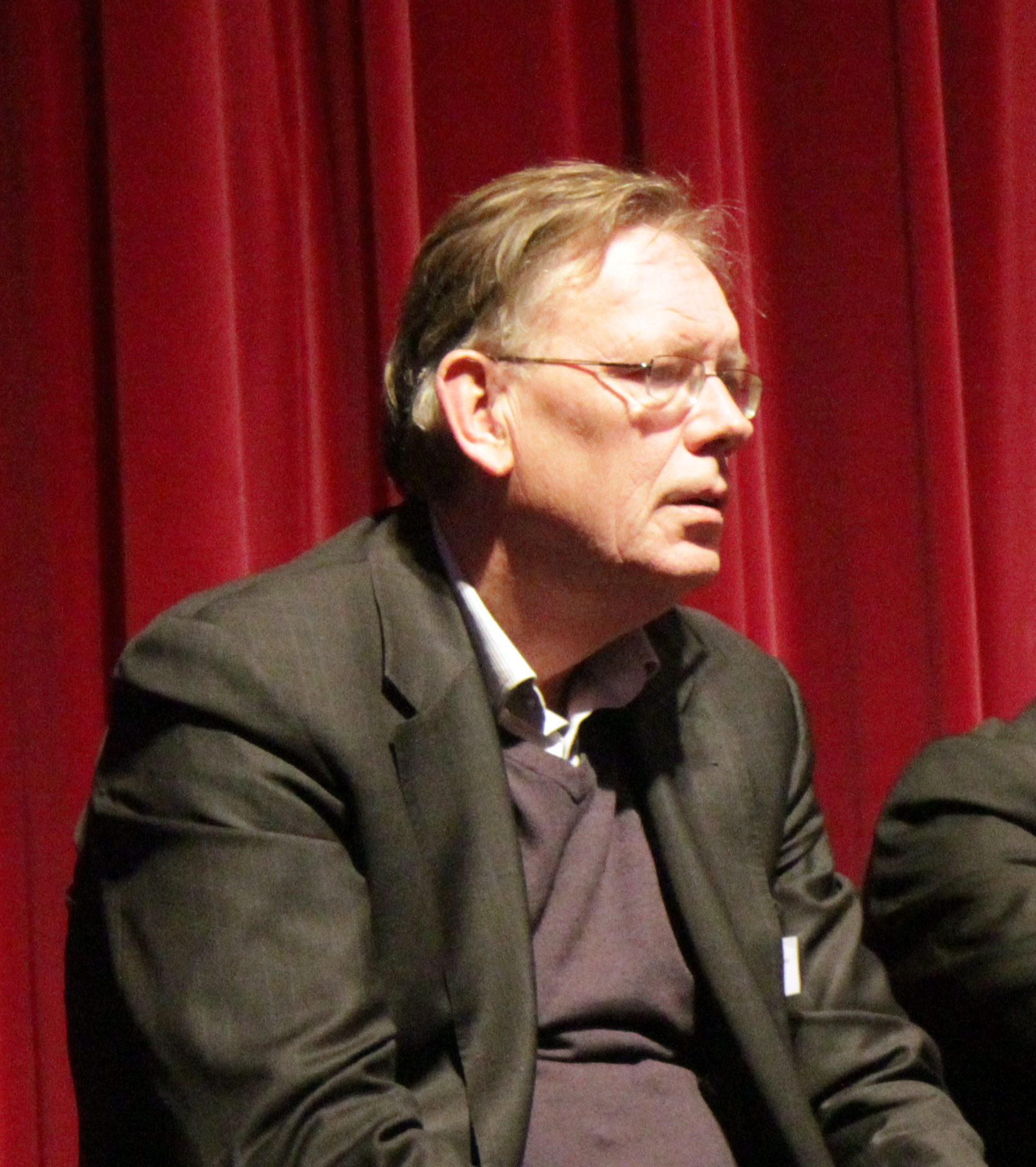 Debat over de toekomst van de Koerden in Irak. Met Jan Marinus Wiersma (Research Fellow WBS)